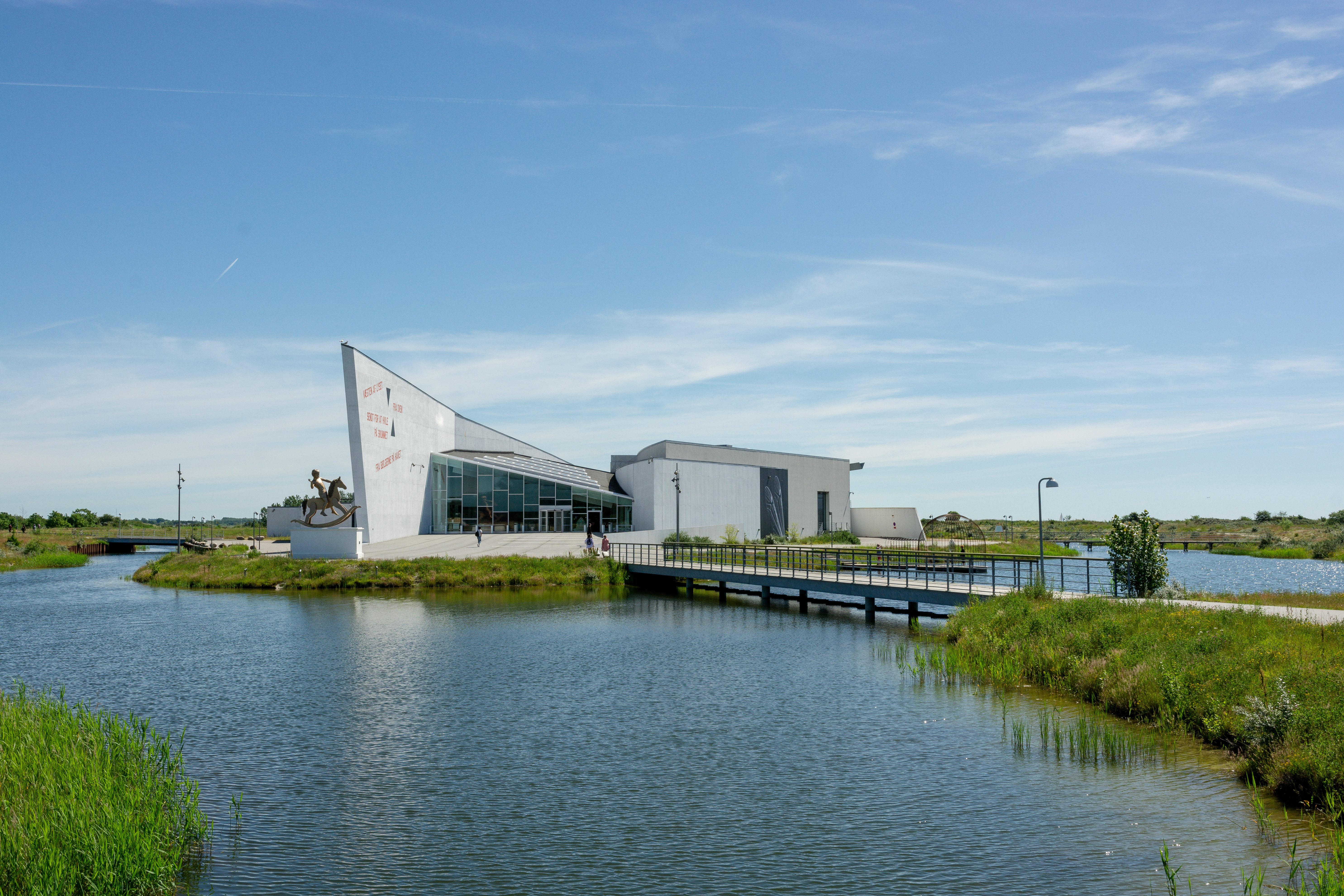 ARKEN Museum of Modern Art